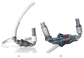 Contoh Alat Bantu Ventrikular Generasi Kedua